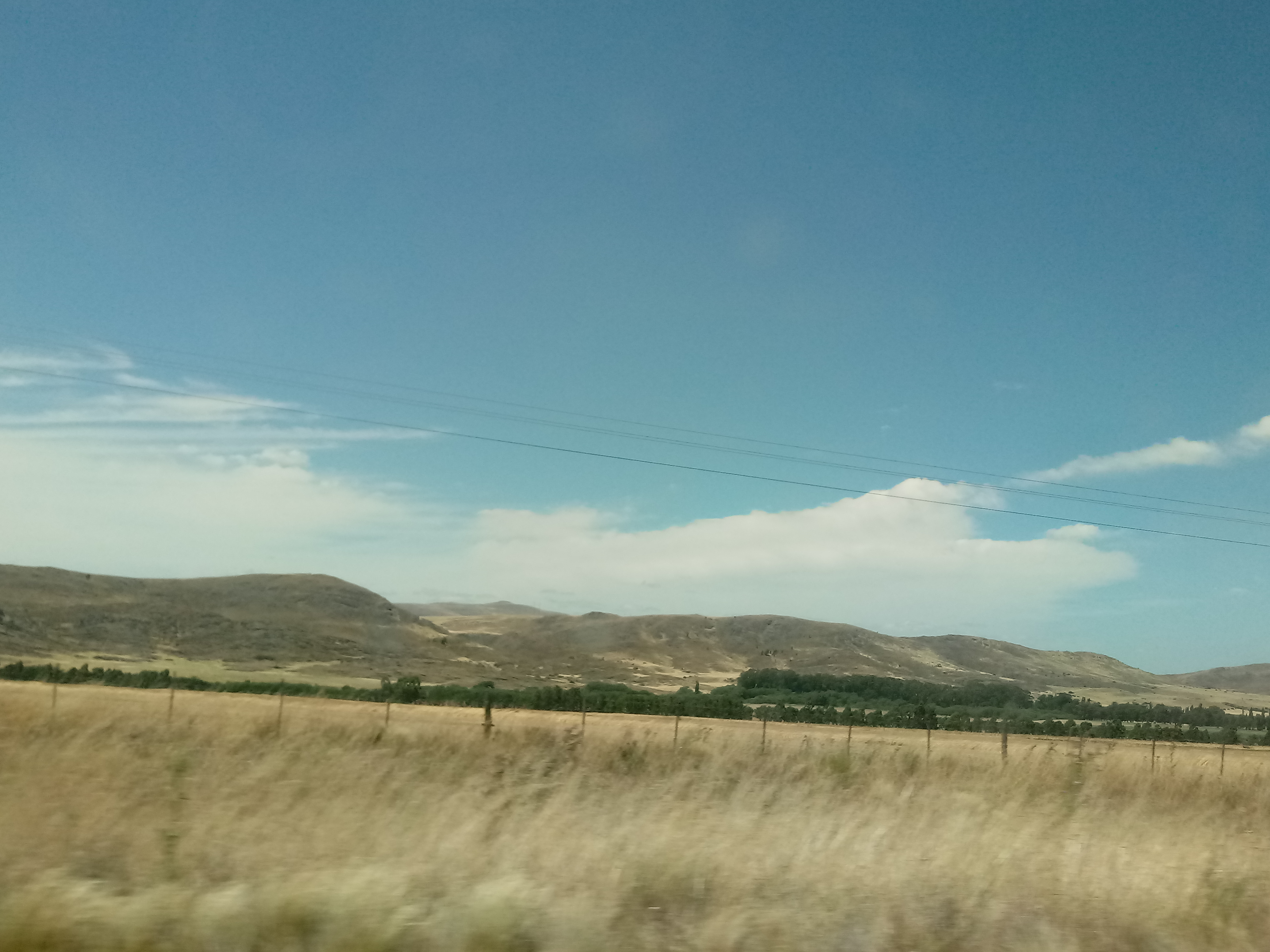 Sierras de Ventania cerca de la localidad de Torquins.